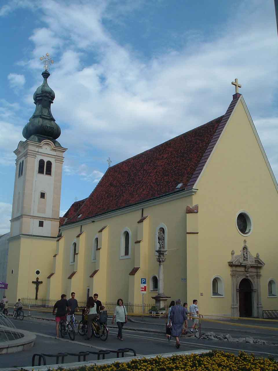 The Franciscan Church in Szombathely. Árpád-házi Szent Erzsébet ferences templom